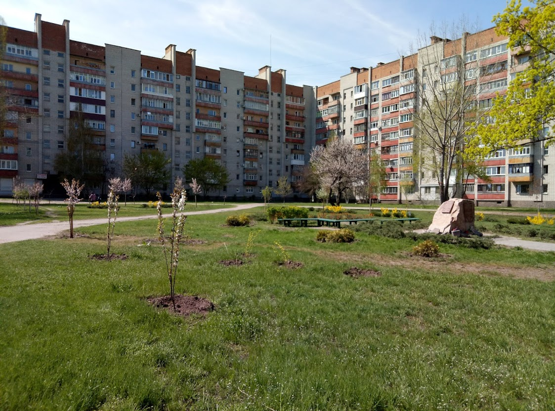 Сквер біля будинку 59 на вулиці Київській у Кременчуці